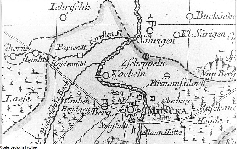 Original image description from the Deutsche Fotothek Bad Muskau-Köbeln. Oberlausitzkarte, Schenk, 1759